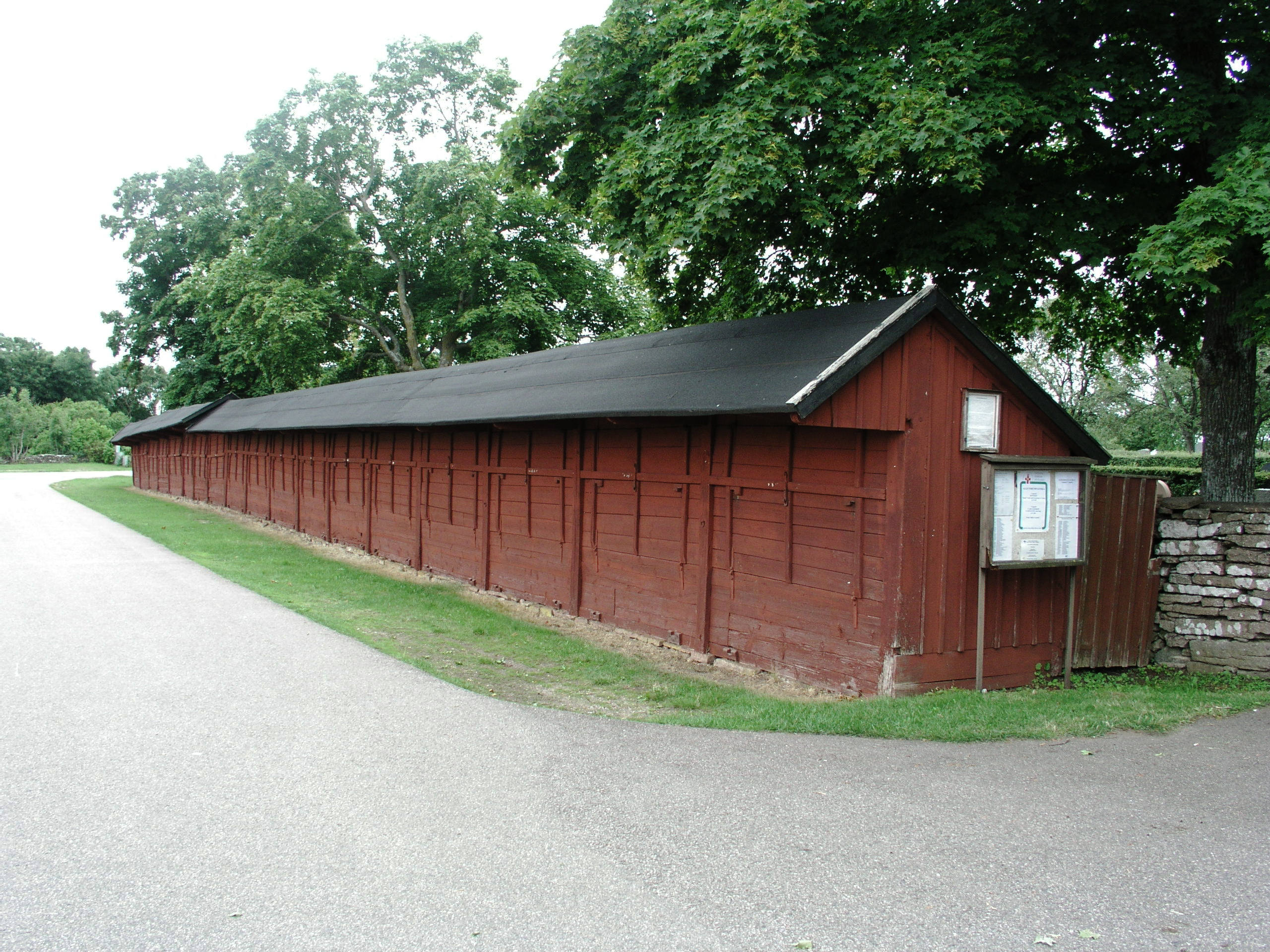 Algutsrums kyrka /church. Mörbylånga kommun, Diocese of Växjö. The market place.